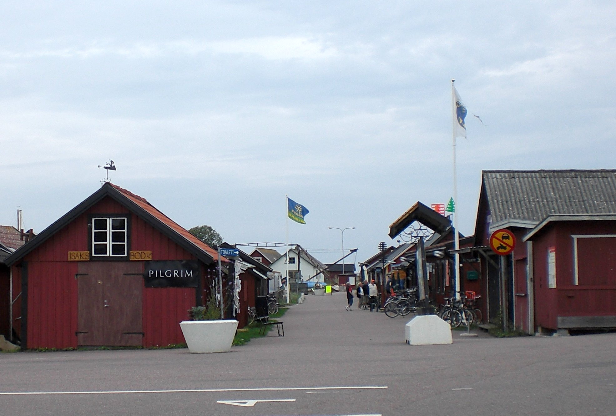 Hafengasse in Byxelkrok, Öland, Schweden